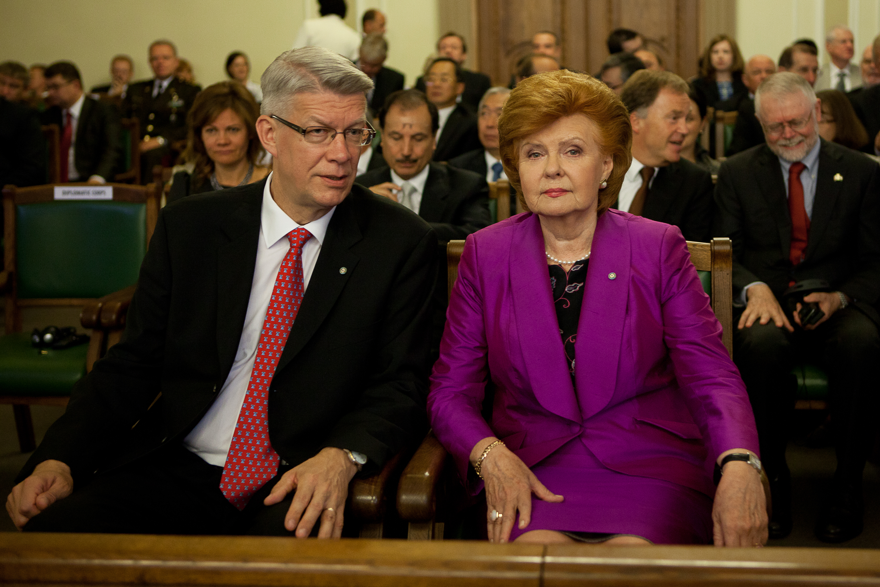 Valdis Zatlers and Vaira Vīķe-Freiberga 2011.gada 8.jūlijs. Saeimas ārkārtas sesijas sēdē, kurā Valsts prezidents Andris Bērziņš nodod svinīgo solījumu. Priekšplānā bijušie Valsts prezidenti Valdis Zatlers un Vaira Vīķe-Freiberga. Foto: Saeima